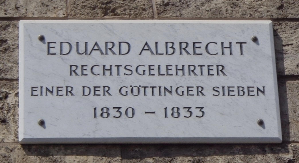 Göttinger Gedenktafel für Wilhelm Eduard Albrecht (Weender Landstraße 8)